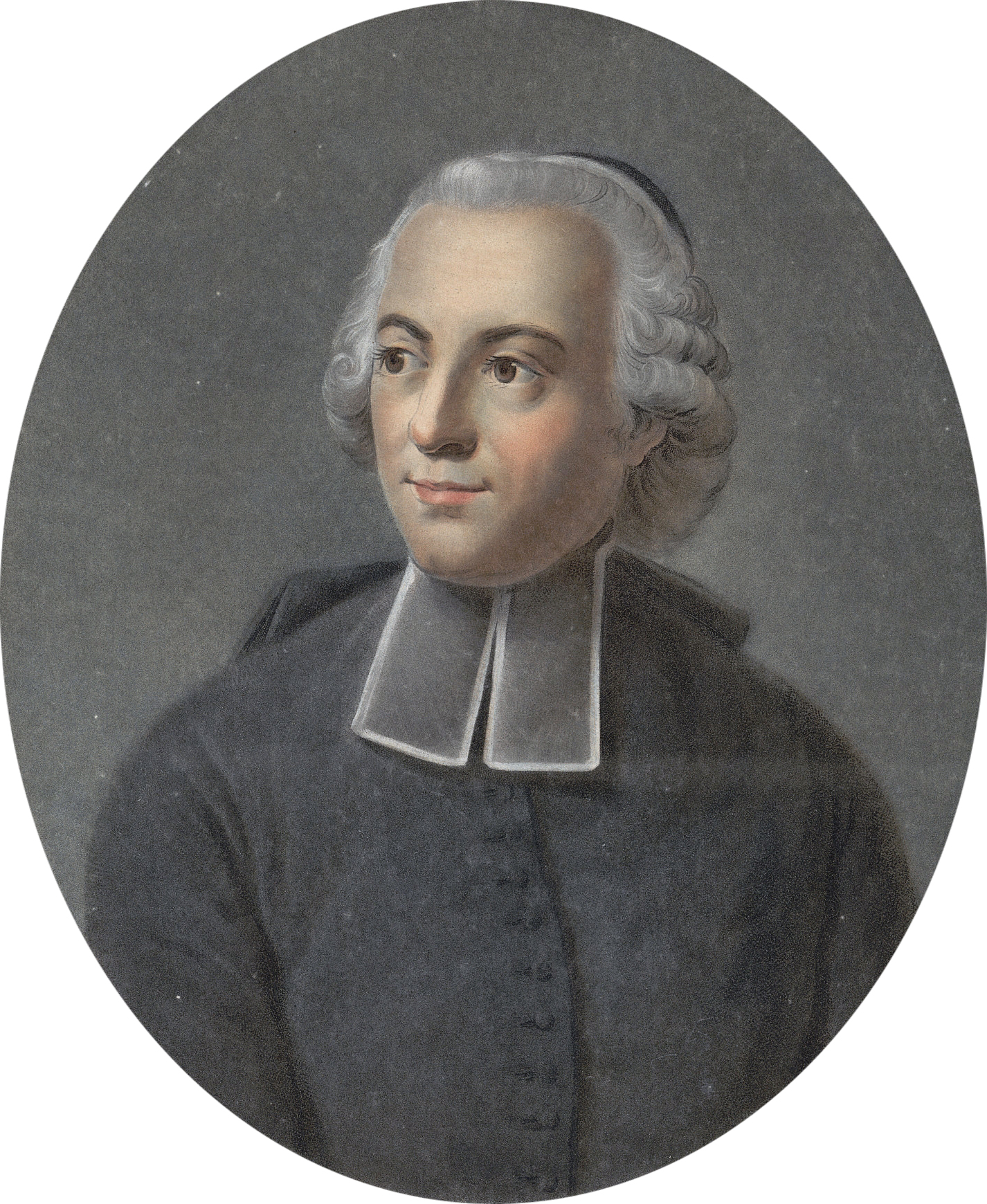 Étienne Bonnot de Condillac